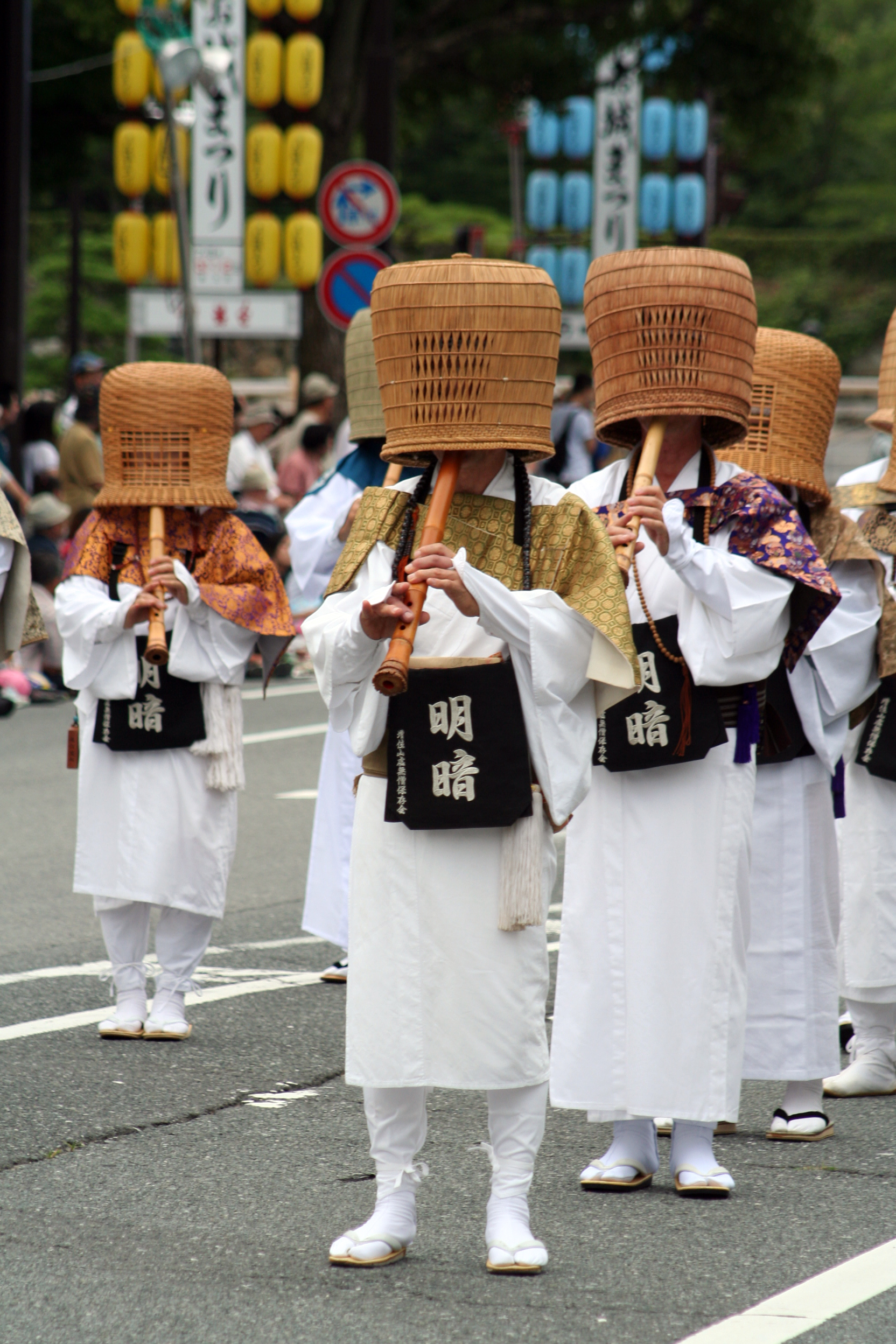 姫路お城祭。兵庫県姫路市にて毎年7月末から8月2日の3日間に渡り姫路城の南部大手前通りにて開催される祭である。第60回開催の2日目の祭の様子。